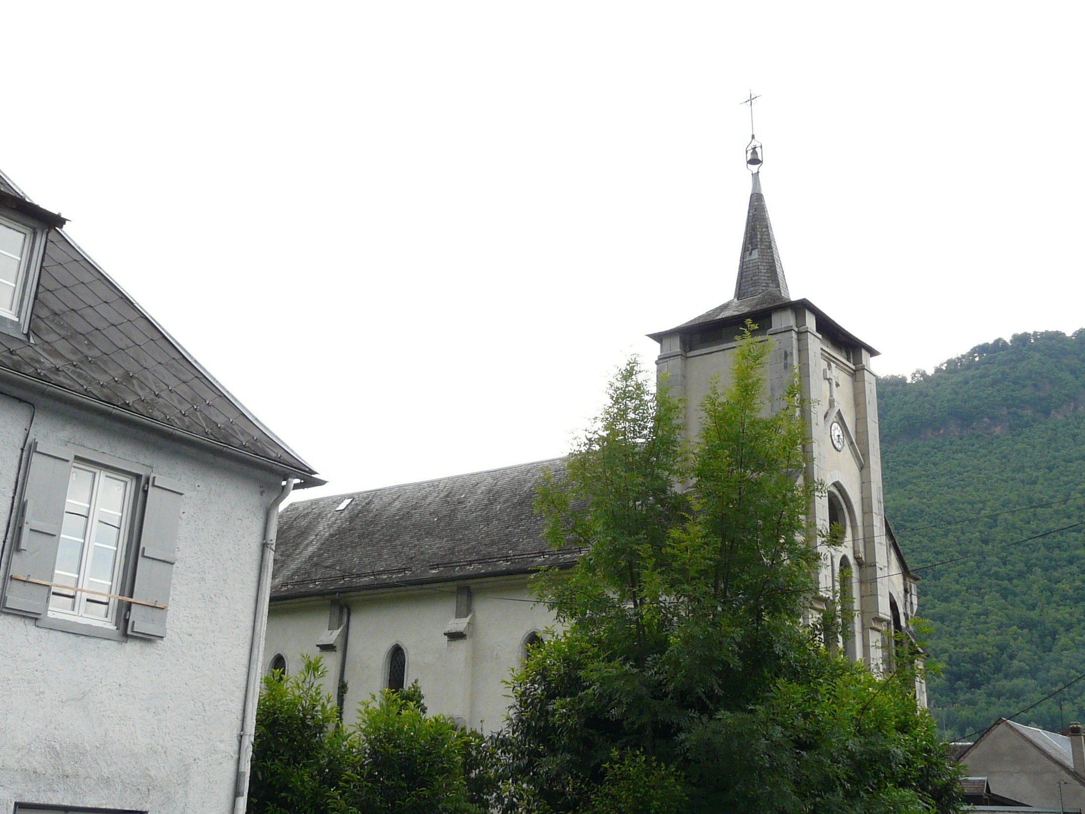 L'église d'Arlos vue du sud-ouest, Haute-Garonne, France.